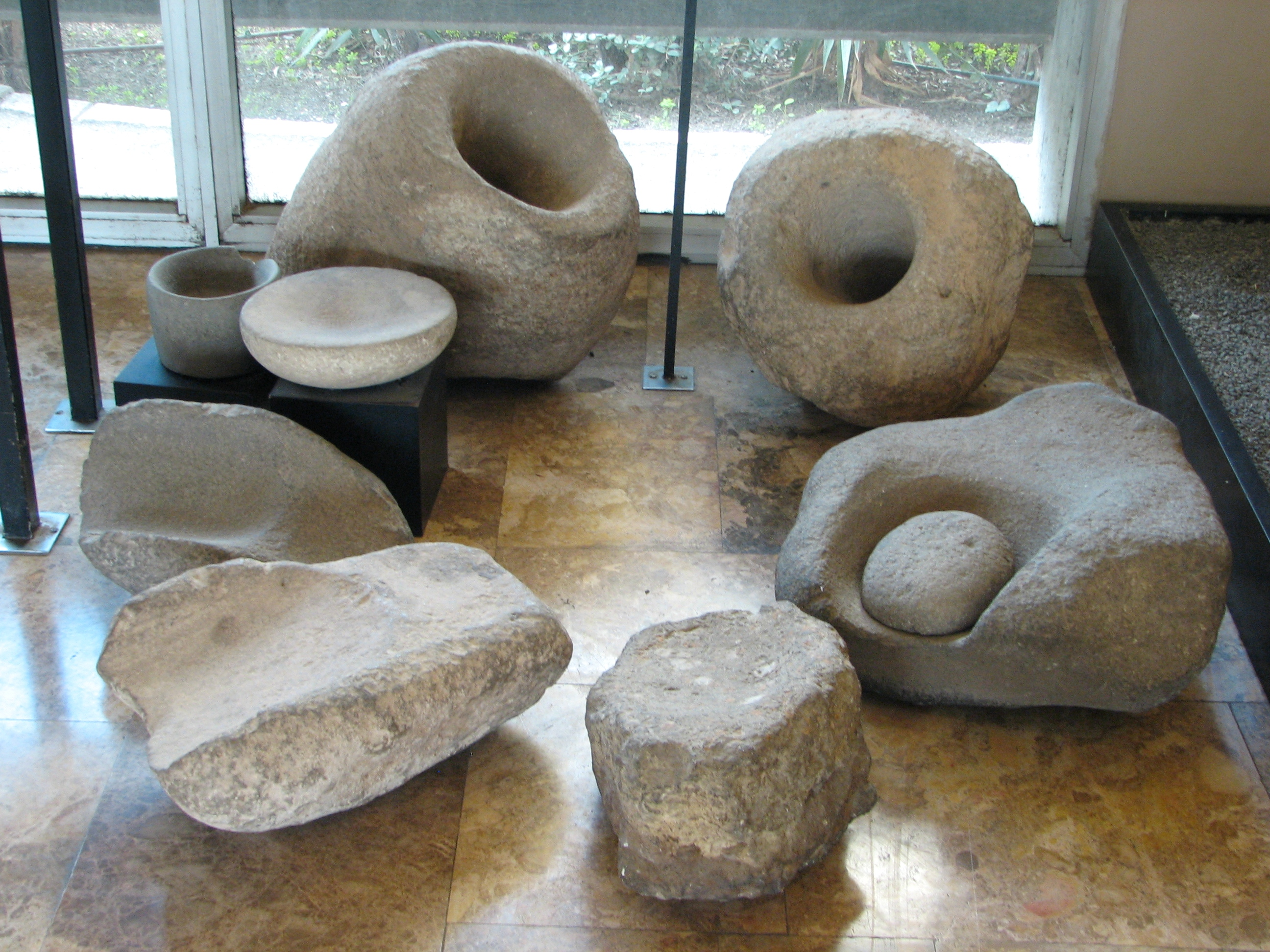 Dagon Museum, Downtown, Haifa, Israel The Museum is dedicated to the history of grain products מוזיאון דגון בעיר התחתית בחיפה שוכן במבנה המשרדים של ממגורות דגון. המוזיאון מוקדש לתולדות הדגן ומוצריו, וכלל ממצאים ארכאולוגים הקשורים בנושא וכן דגמים של מתקנים שונים בהם משתמשים בממגורות דגון מימין ומאחור מכתשים מהתרבות הנטופית . משמאל וקדימה אבני ריחיים מהתקופה הנאוליתית קדם קראמית הממצאים מאתר נחל אורן